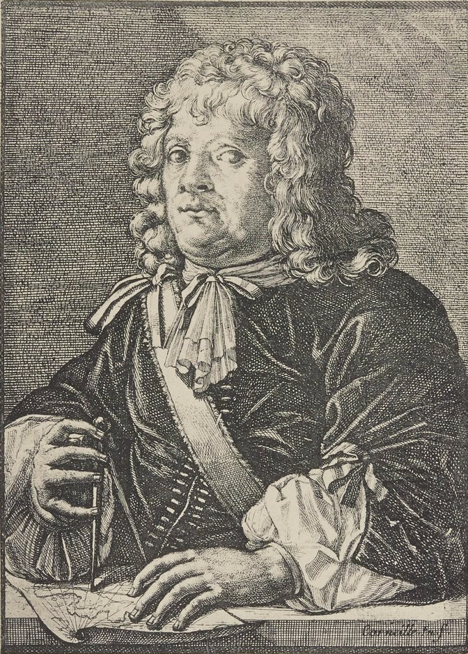 Portrait d'Étienne de Flacourt